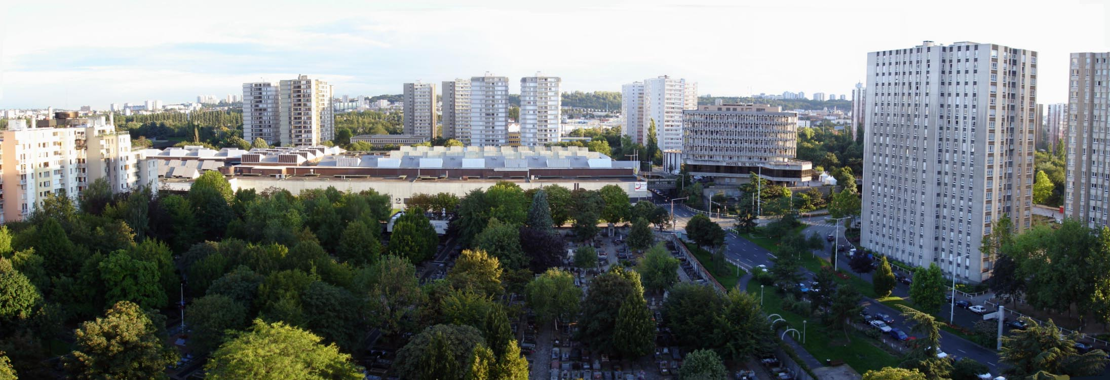 Vue panoramique du centre-ville depuis la cité Paul-Vaillant-Couturier, Bobigny (France).